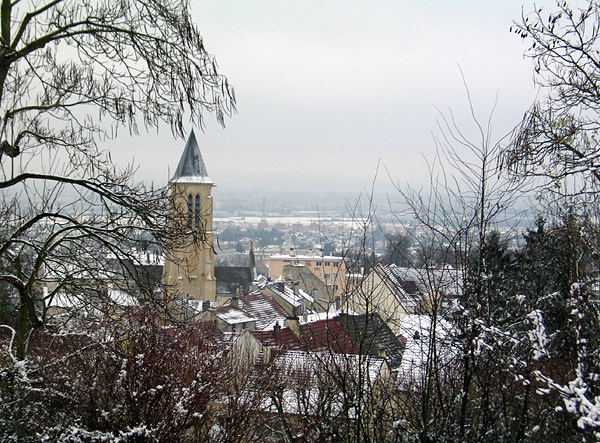 Cormeilles-en-parisis sous la neige, vue prise depuis le parc Schlumberger.